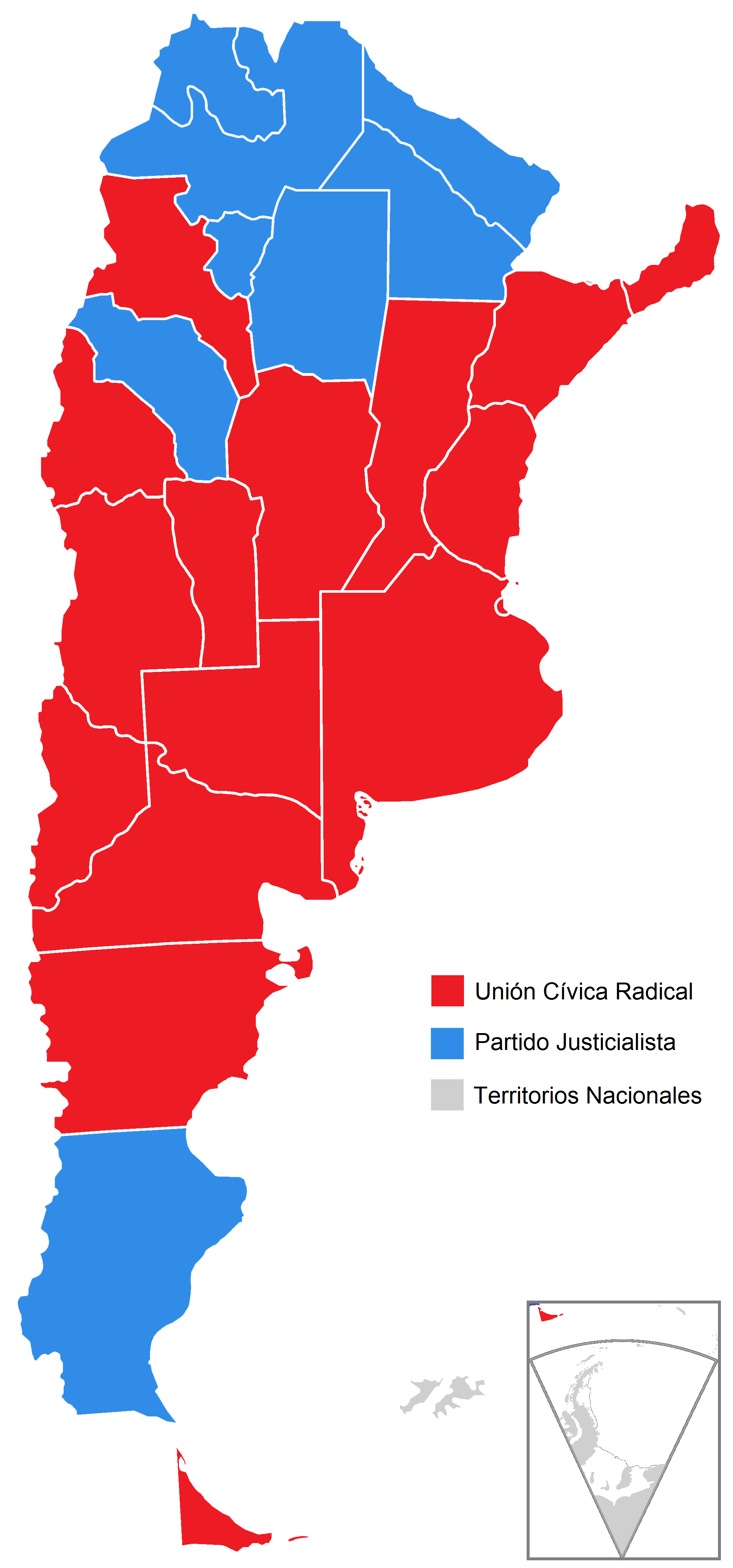 Mapa de las elecciones presidenciales de Argentina de 1983